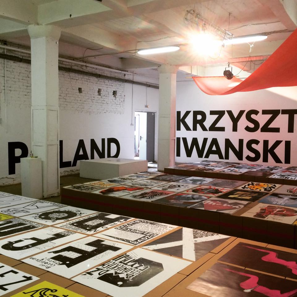 Typomania 2016: выставка Яна Байтлика и Кшиштофа Иваньского